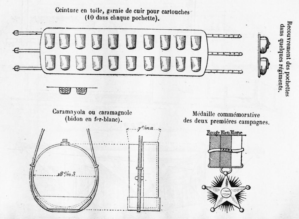 imagenes del libro Recuerdos de una Misión en el Ejército Chileno del oficial francés Eugène Marie Le Léon 1